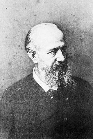 Photo louis de Wecker vers 1890